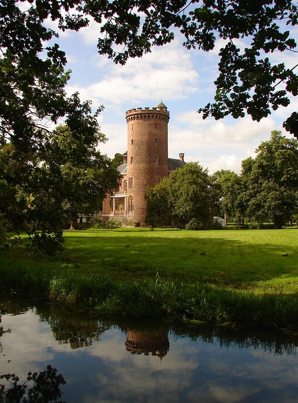 Kasteel Sterkenburg, nabij Langbroek